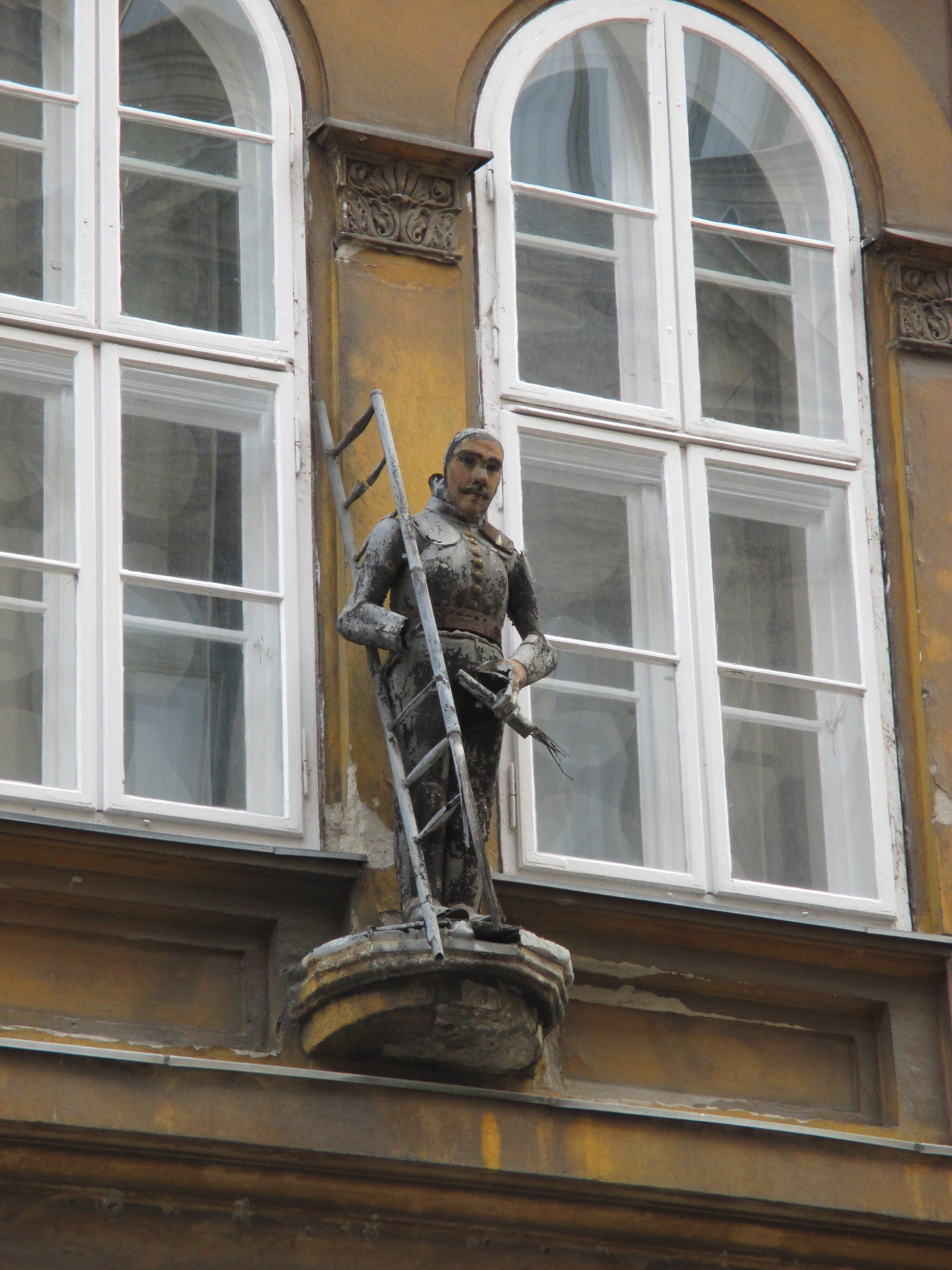 Kéményseprő szobra a Bródy Sándor utca 15. számú ház homlokzatán, Budapesten